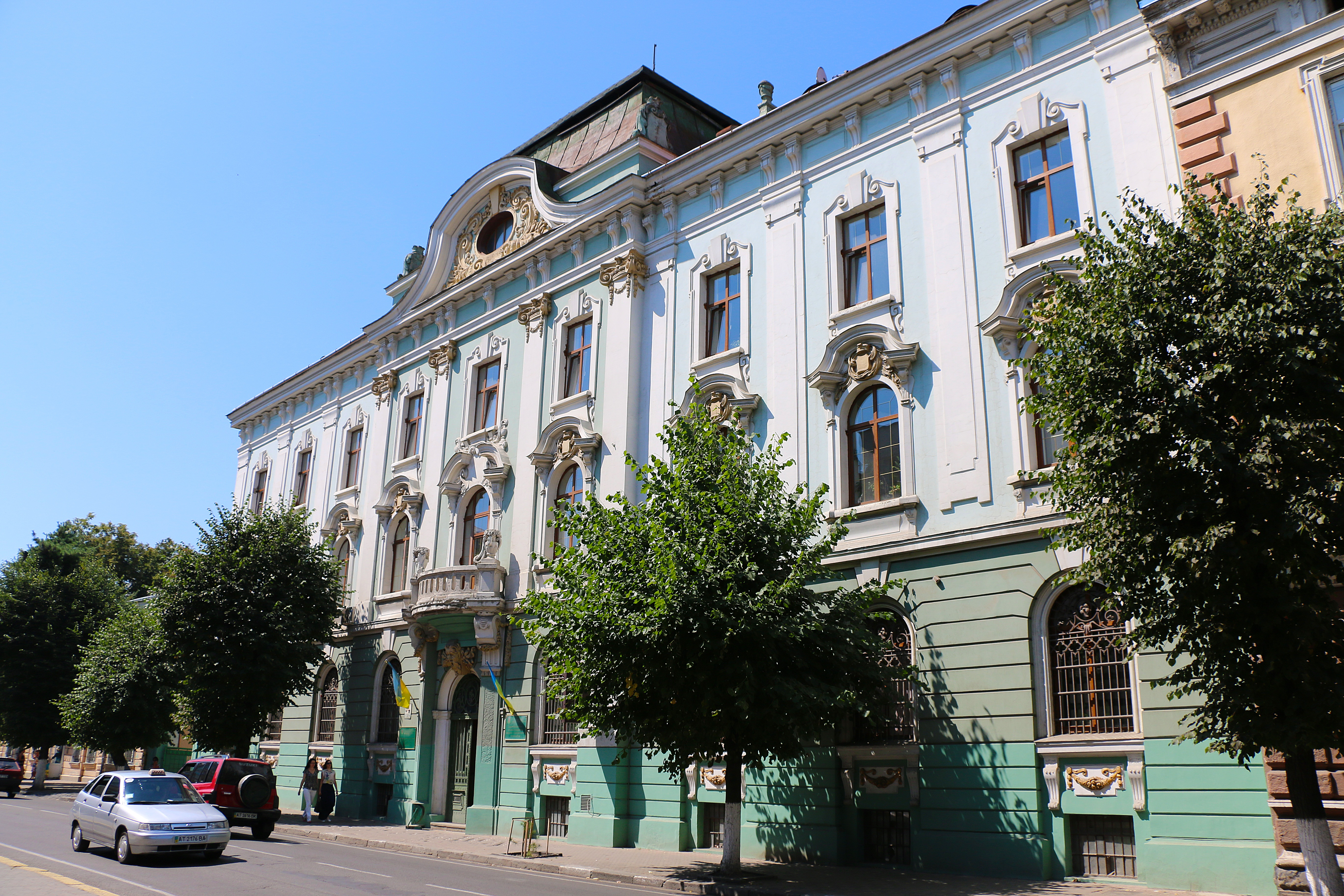 Окружна фінансова дирекція (мур.), Івано-Франківськ, вул. М. Грушевського, 31